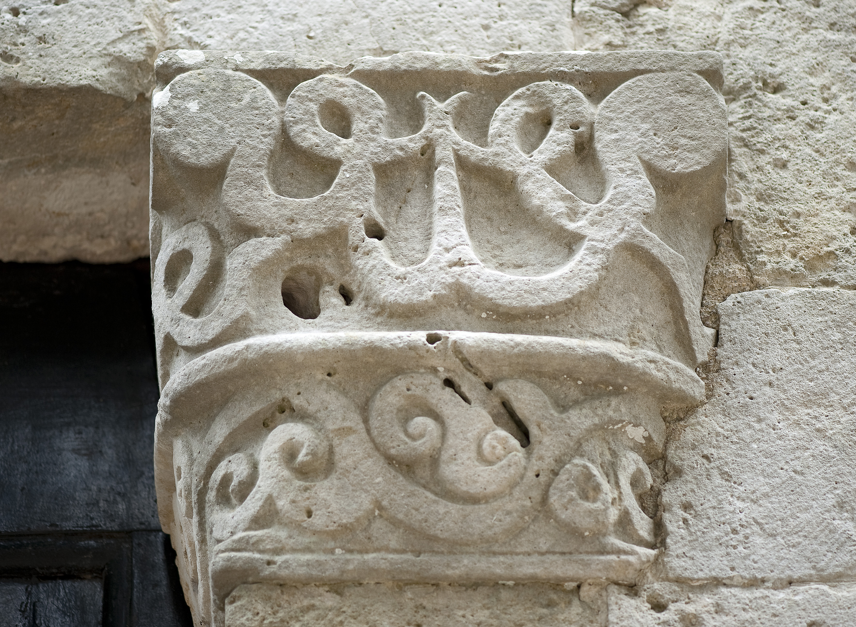 Capitello del portale della pieve di Santa Maria Assunta a Cellole - San Gimignano